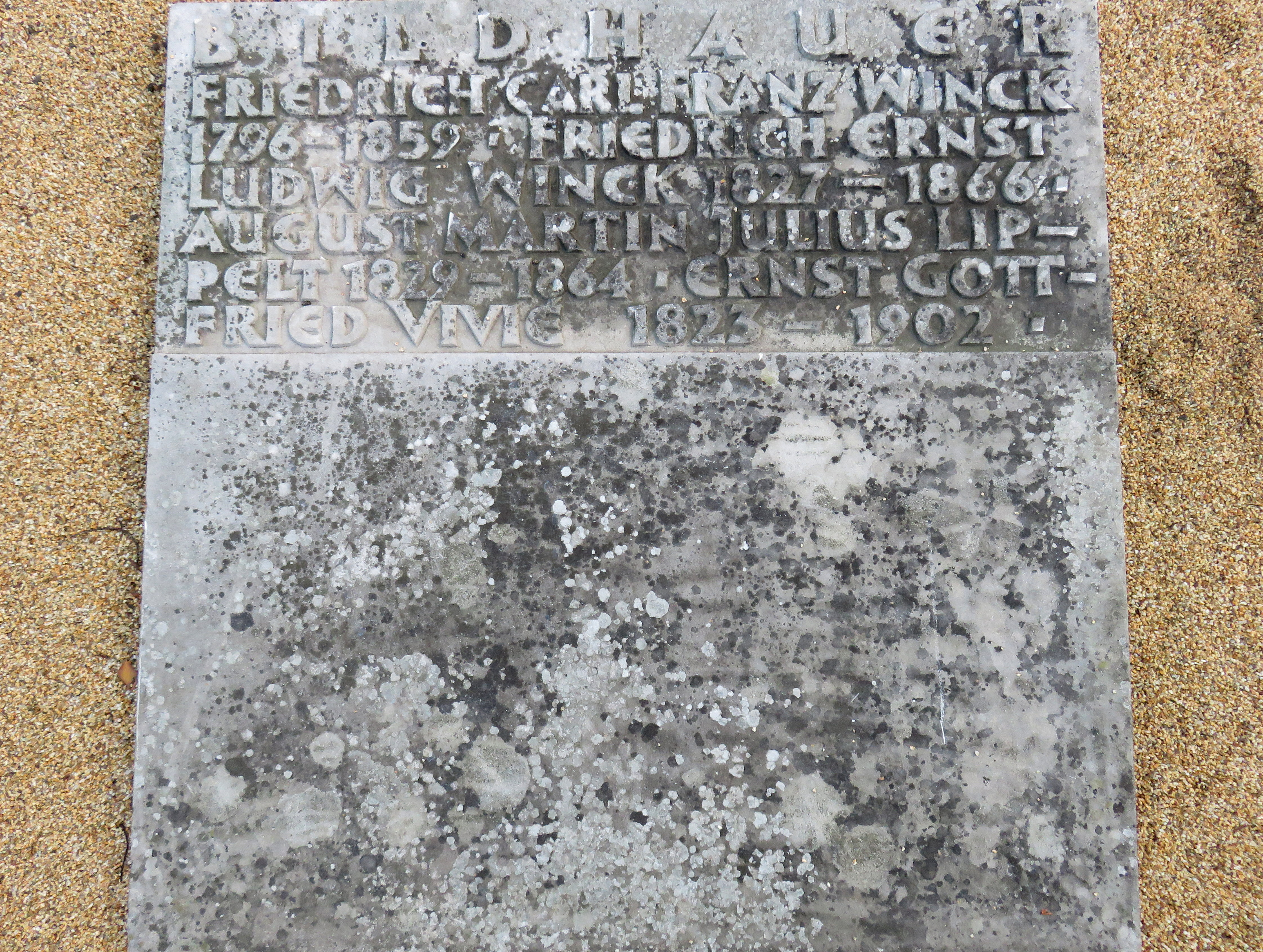 Sammelgrabmal Bildhauer im Bereich des Althamburgischen Gedächtnisfriedhofs auf dem Hamburger Friedhof Ohlsdorf zu Ehren von u. a. Julius Lippelt, Ernst Gottfried Vivié.